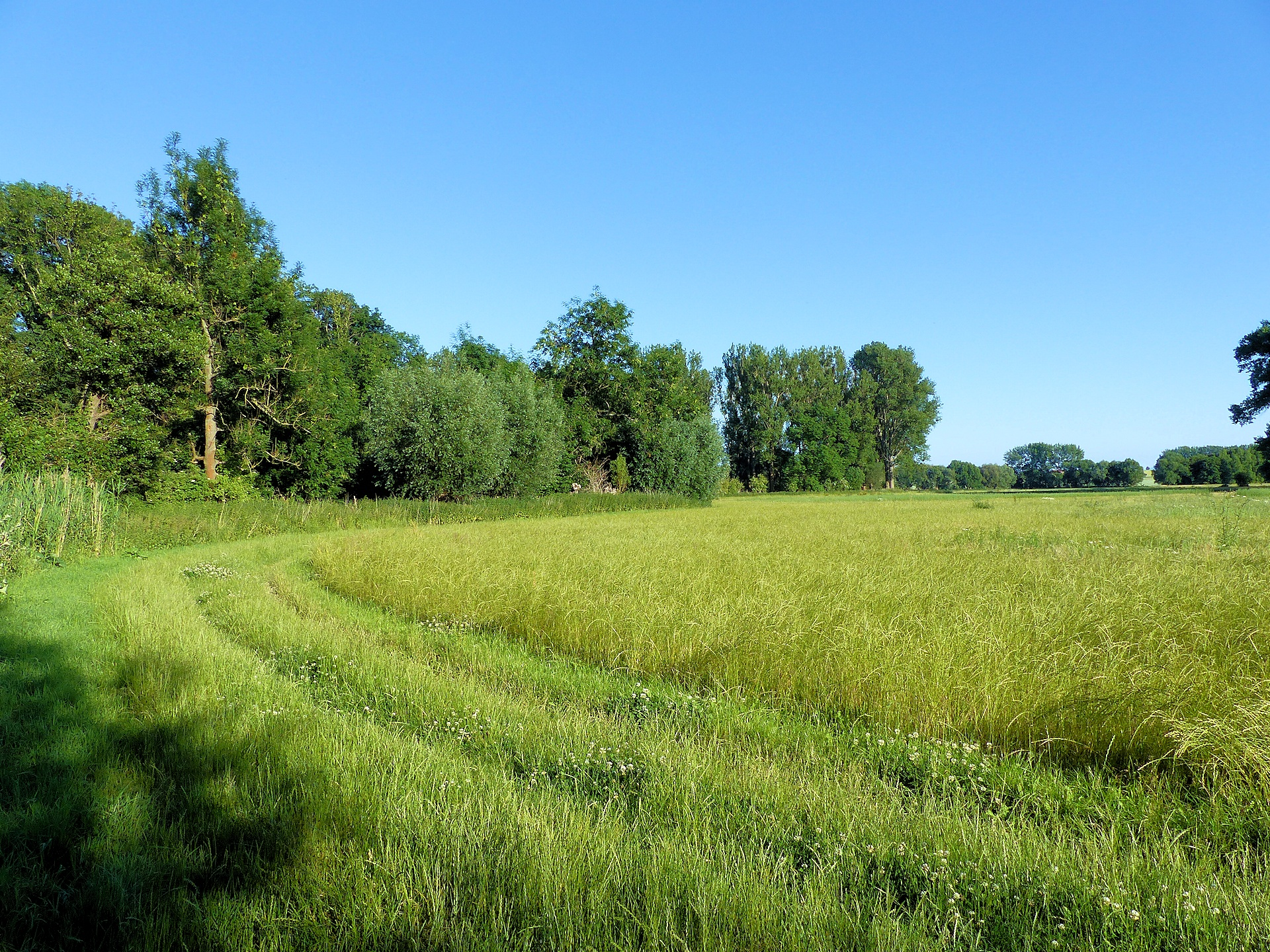 Blick vom Rand des Ritterguts nach Süden, der Waldrand entspricht dem Verlauf der Alten Ilse.